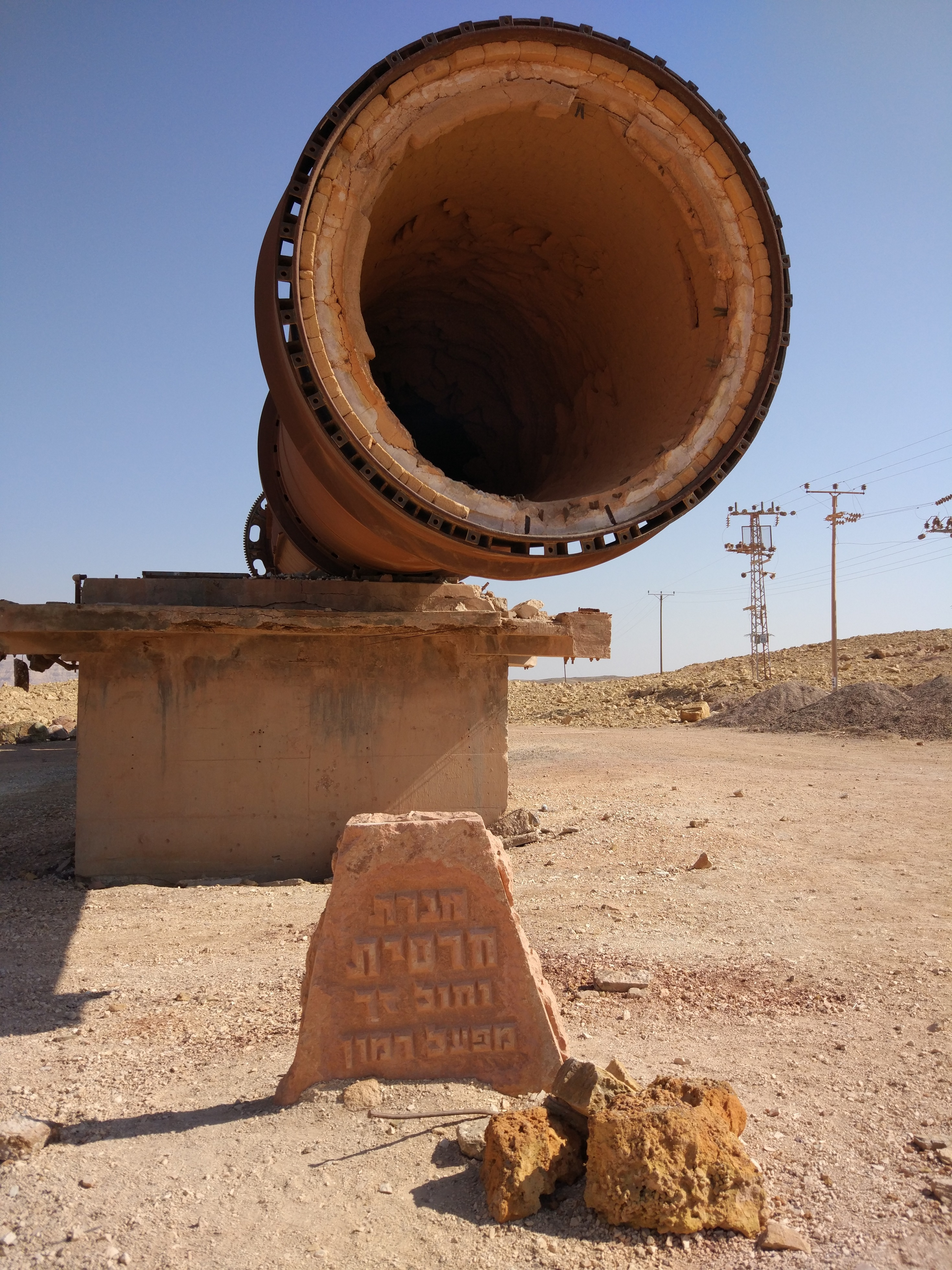 תנור אשר שימש את חברת חרסית וחול רך לאפיית חרסית דמוית צור לצורך יצירת אלומינה. התנור נמצא כיום בציר צבעי הרמון אשר במכתש רמון.